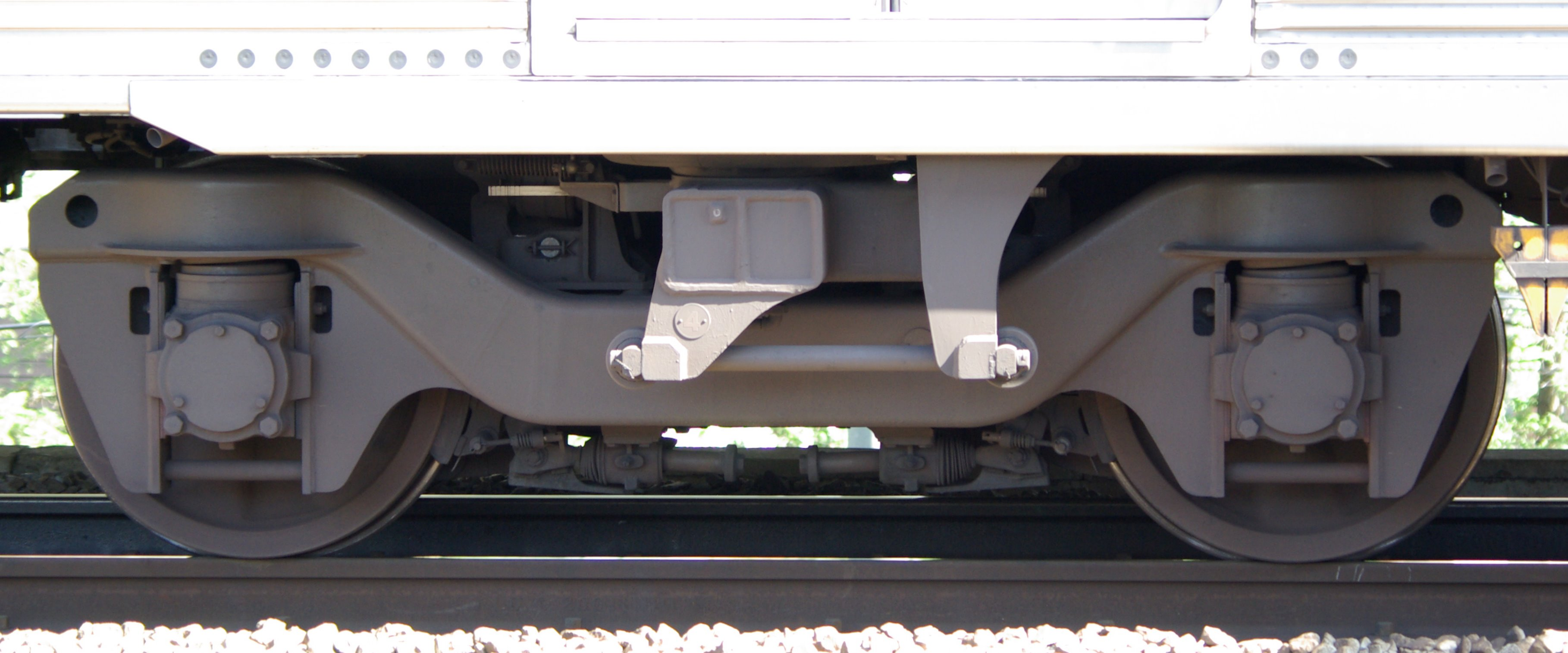 東急8500系 TS-807A動力台車（デハ8869号）